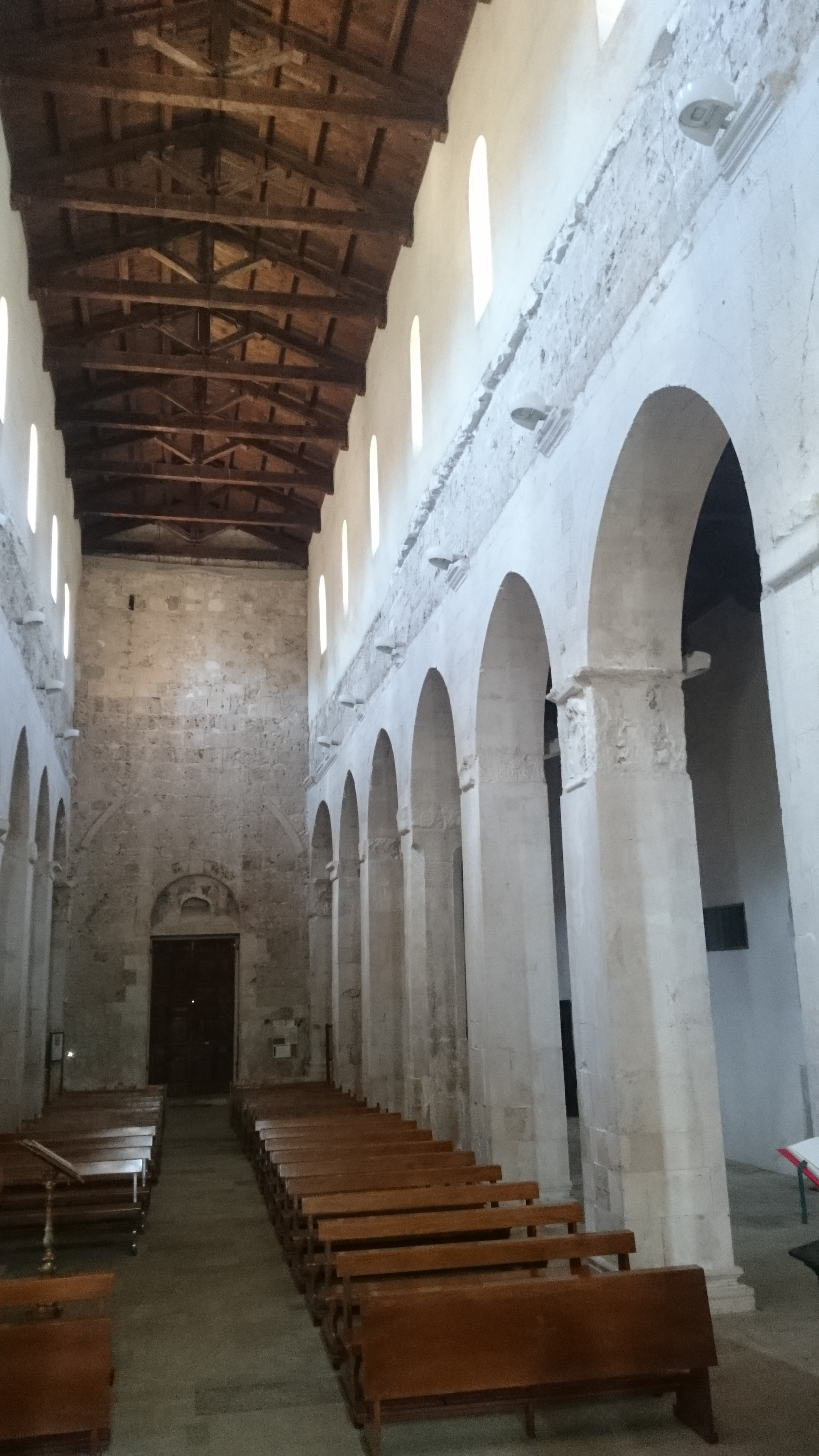 Corfinio (AQ): Basilica concattedrale valvense di San Pelino